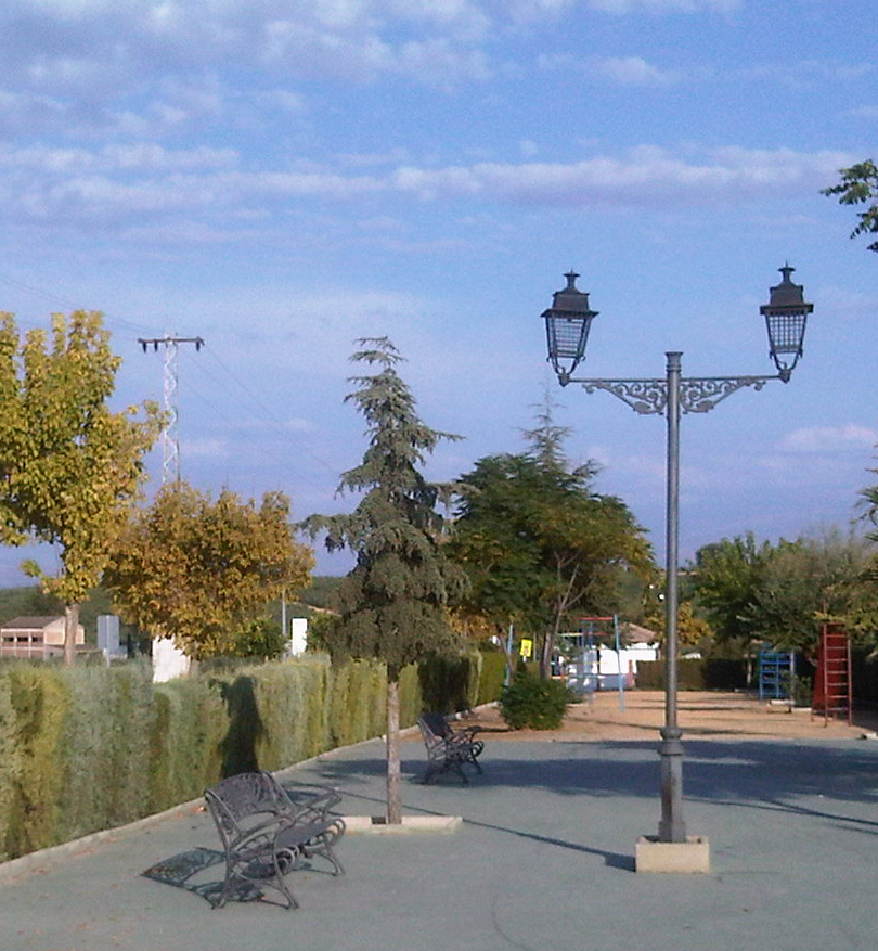 Parque situado en la Calle Láchar, en la localidad de Peñuelas (municipio de Láchar, Granada, España).